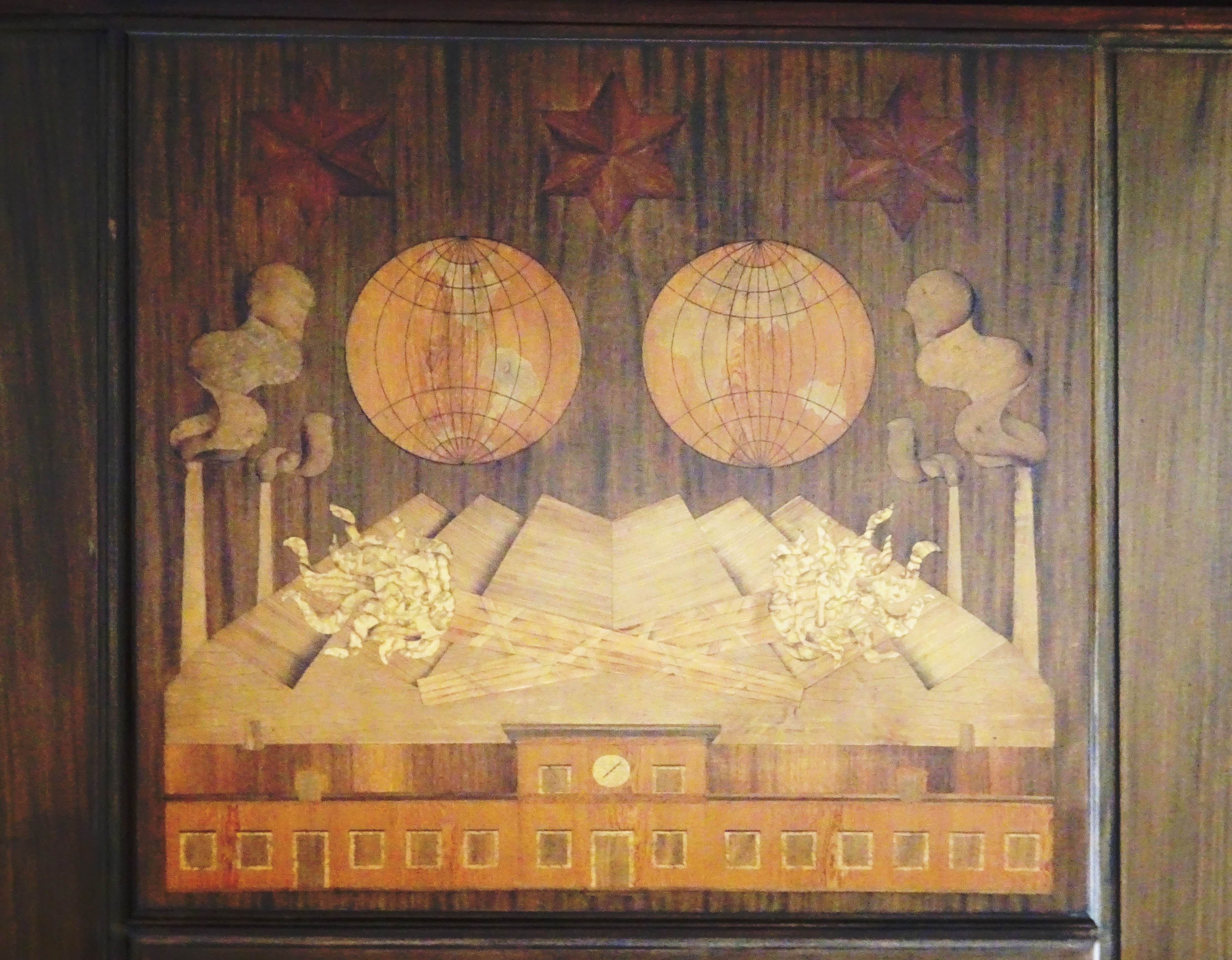 Tändstickspalatset Kreugers rum, intarsia visande Sveriges första tändsticksfabrik